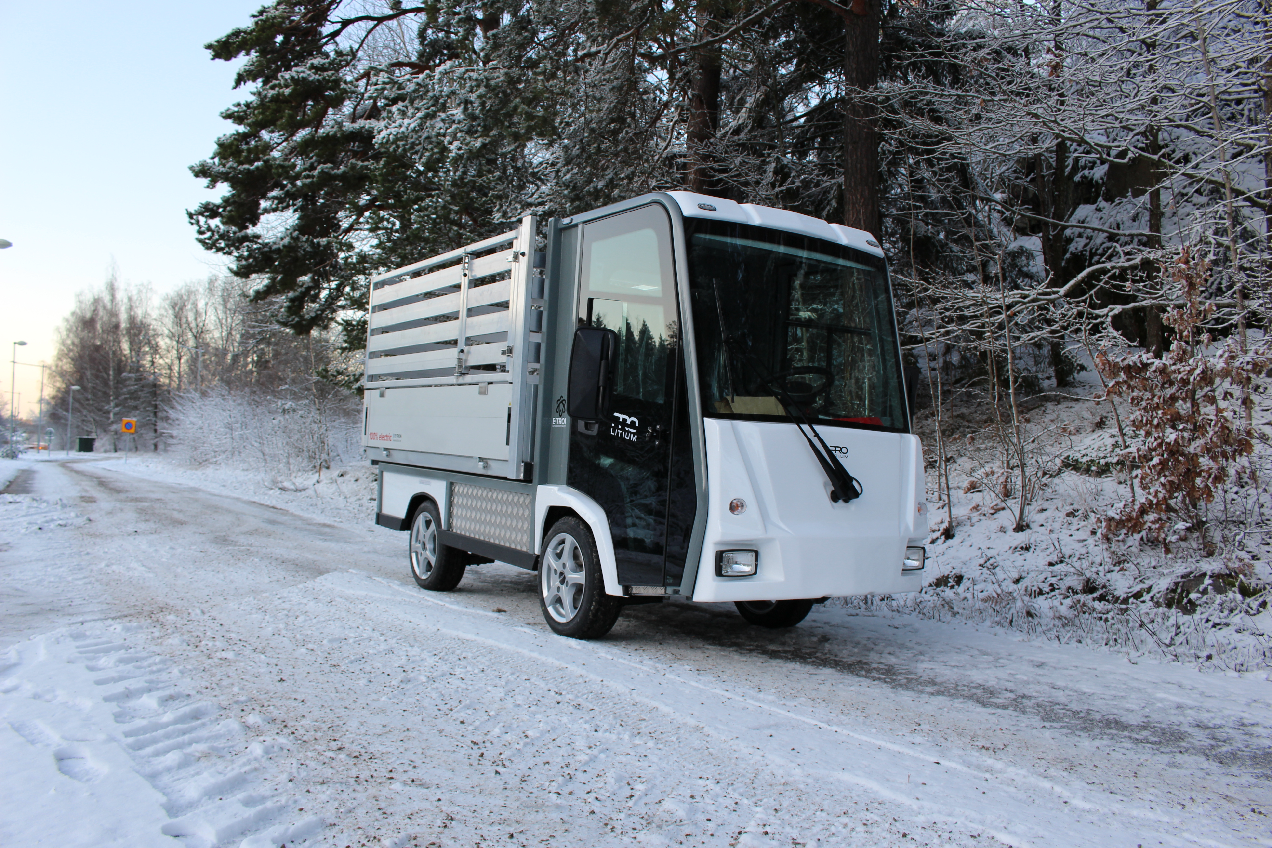 PRO Litium eldrivet arbetsfordon